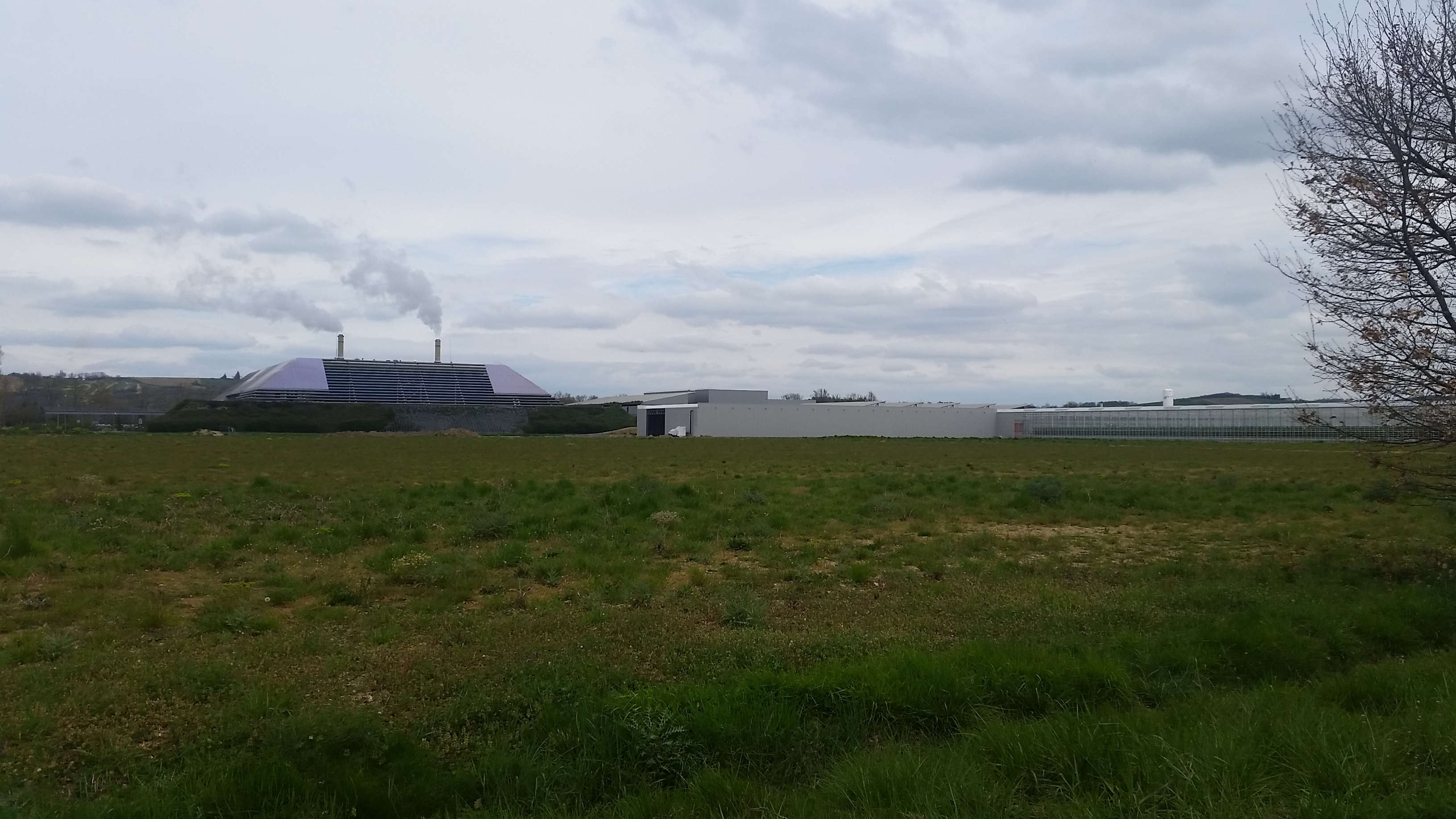 Serres en construction dans la ville de Bessières (Haute Garonne)